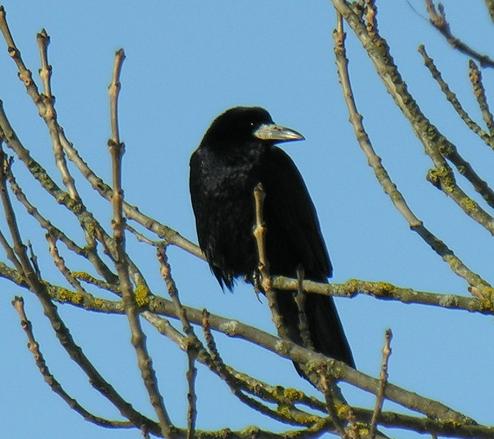 Corvus frugilegus